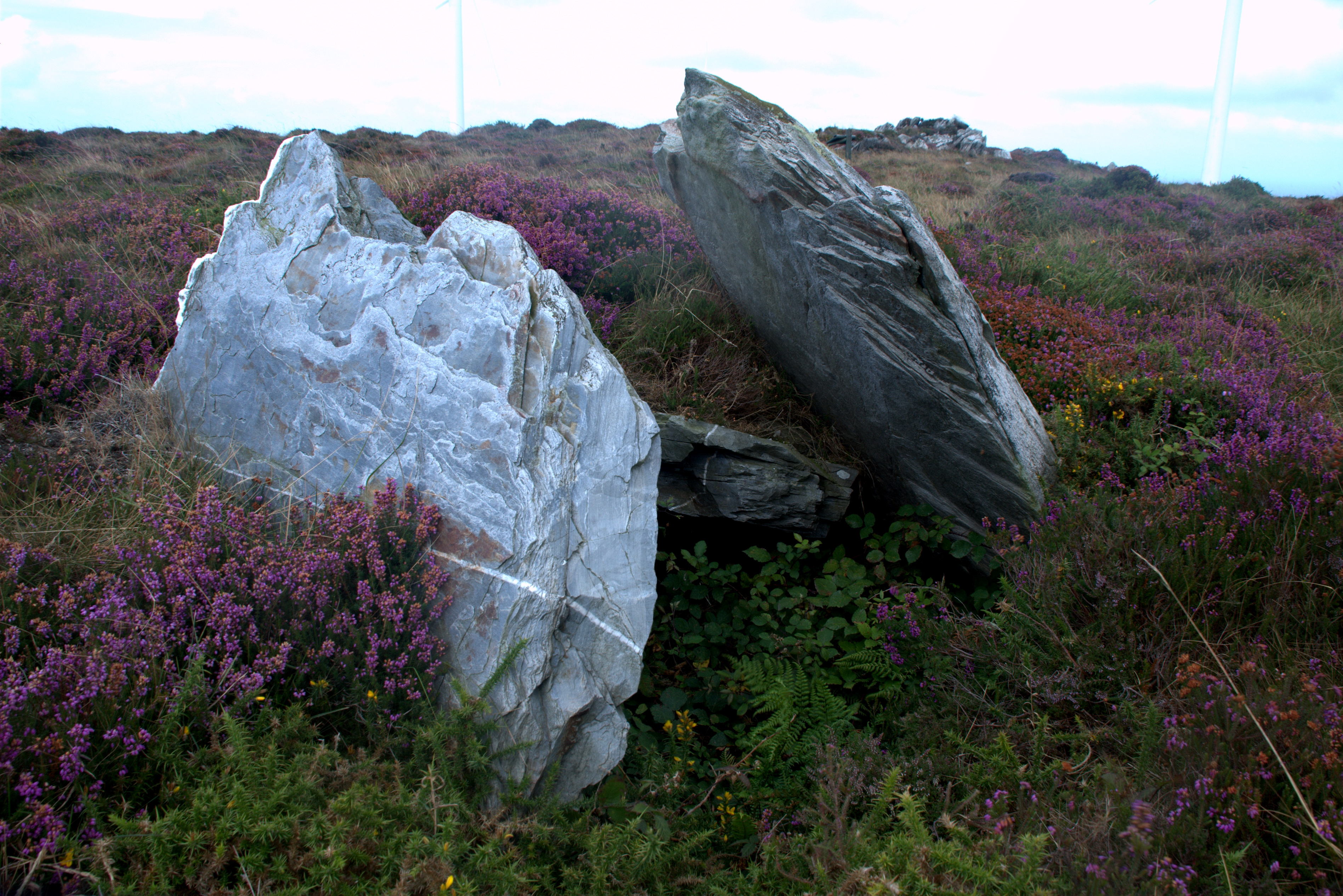 Anta chamada de "Forno dos mouros", nome típico para as antas/dolmens na Galiza e em Portugal.